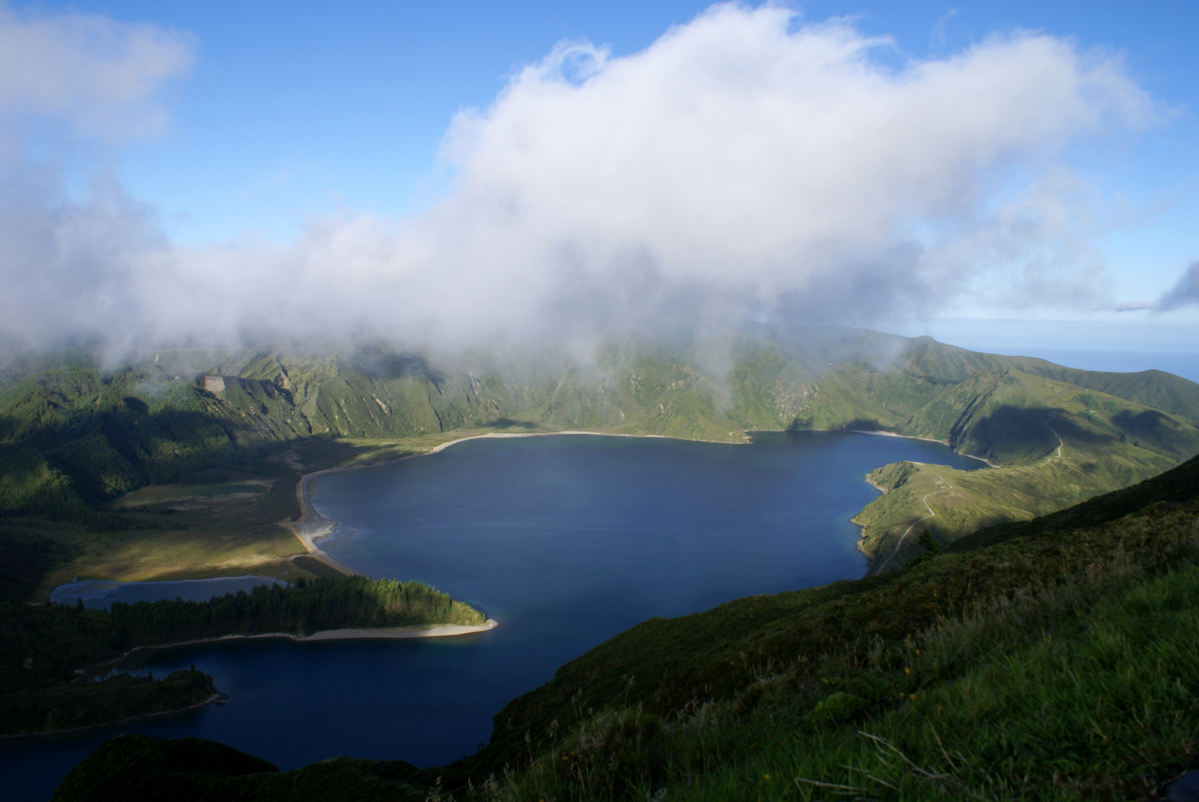 Lagoa do Fogo, Miradouro da Serra da Barrosa, Vila Franca do Campo, ilha de São Miguel, Açores